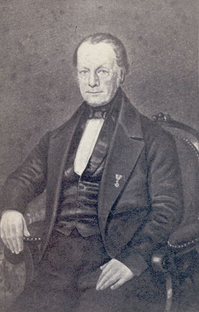 Portret van Abraham Boxman.